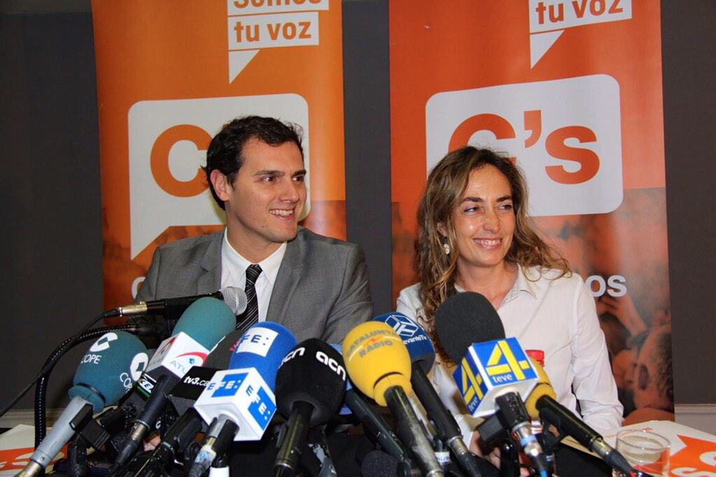 Albert Rivera y Carolina Punset durante la rueda de prensa para la presentación candidatura de Punset a la Presidencia de la Generalitat Valenciana. En Valencia, el 02 de febrero de 2014